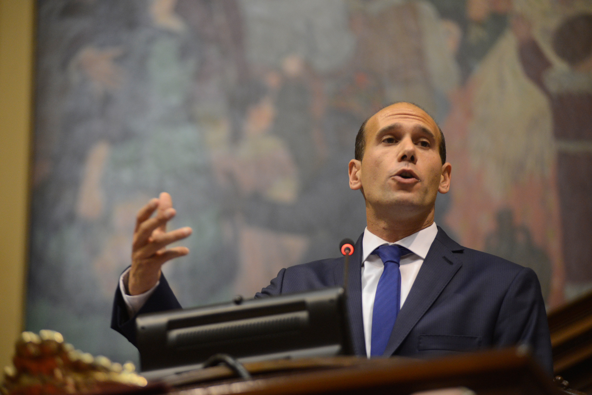 Discurso de Asunción Presidente Martín Lema